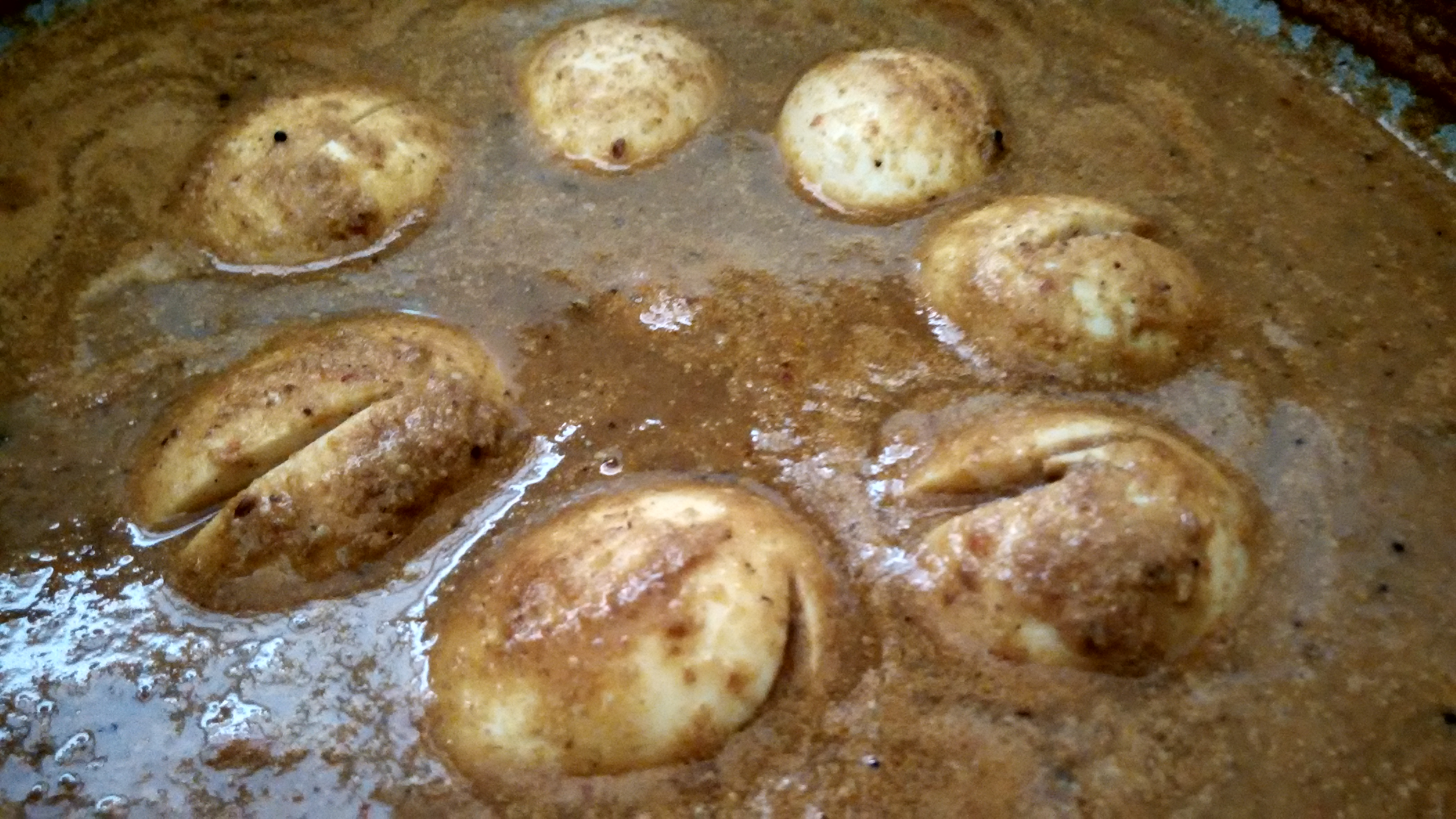 முட்டைக்குழம்பு